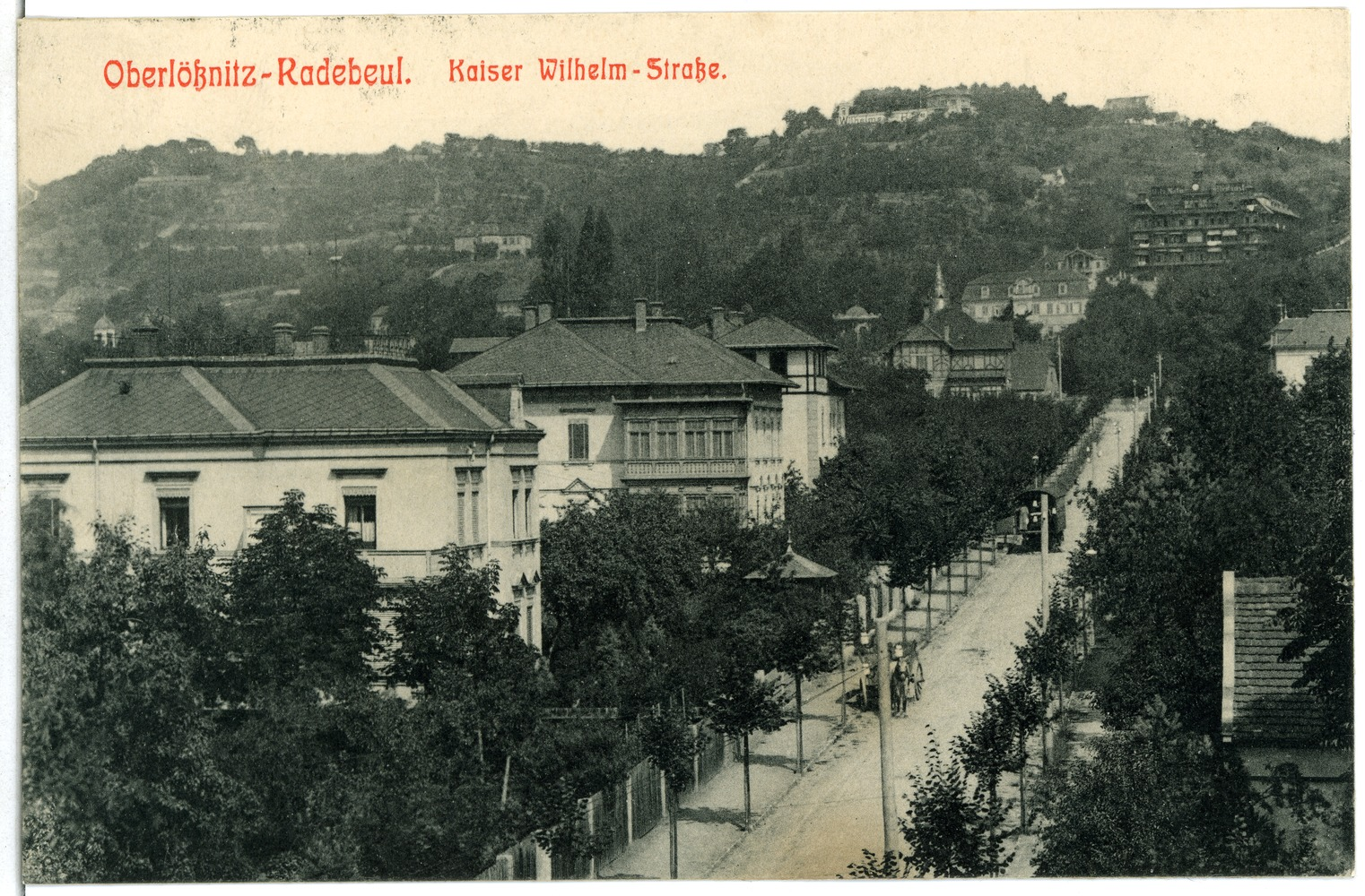 Radebeul; Kaiser Wilhelm Straße This postcard is from publisher Brück & Sohn in Meißen ( postcard has a unique number 01884 and is available in a higher resolution at the publisher. This images was uploaded in a cooperation project between Wikipedians and the publisher.